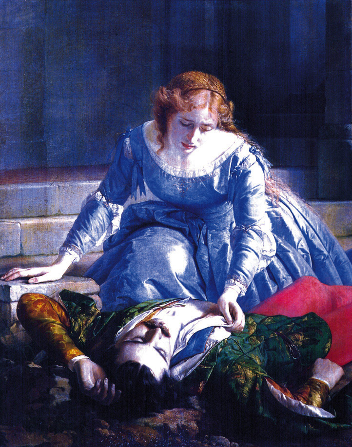 Pacifico Buzio, Imelda de' Lambertazzi presso il cadavere dell'amato, olio su tela, Musei civici, Pavia. Nel 1864 il quadro è premiato al Concorso Frank, diventando così proprietà del Municipio. L'opera rappresenta l'epilogo del romanzo "I Lambertazzi e i Geremei", pubblicato nel 1830 da Defendente Sacchi.